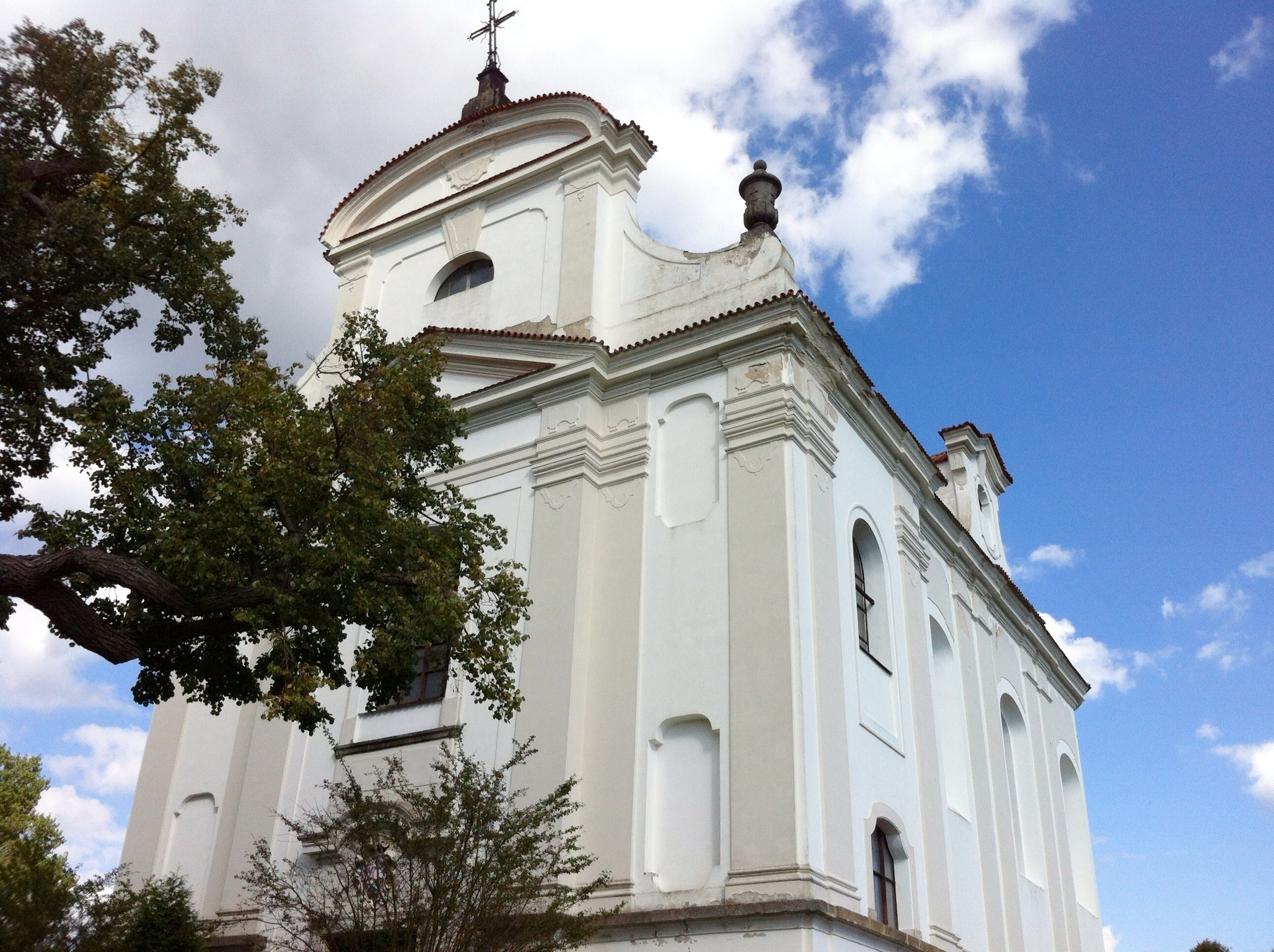 Kostel sv. Jana Křtitele v Radomyšli ze západu